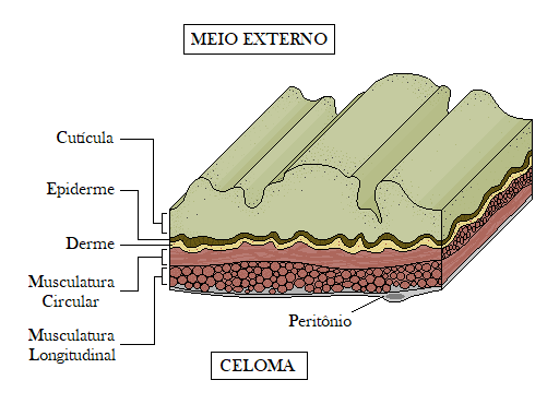 O esquema mostra as diferentes camadas de células que constituem a parede do corpo desse grupo de anelídeos, além de indicar as regiões externa e interna dele.